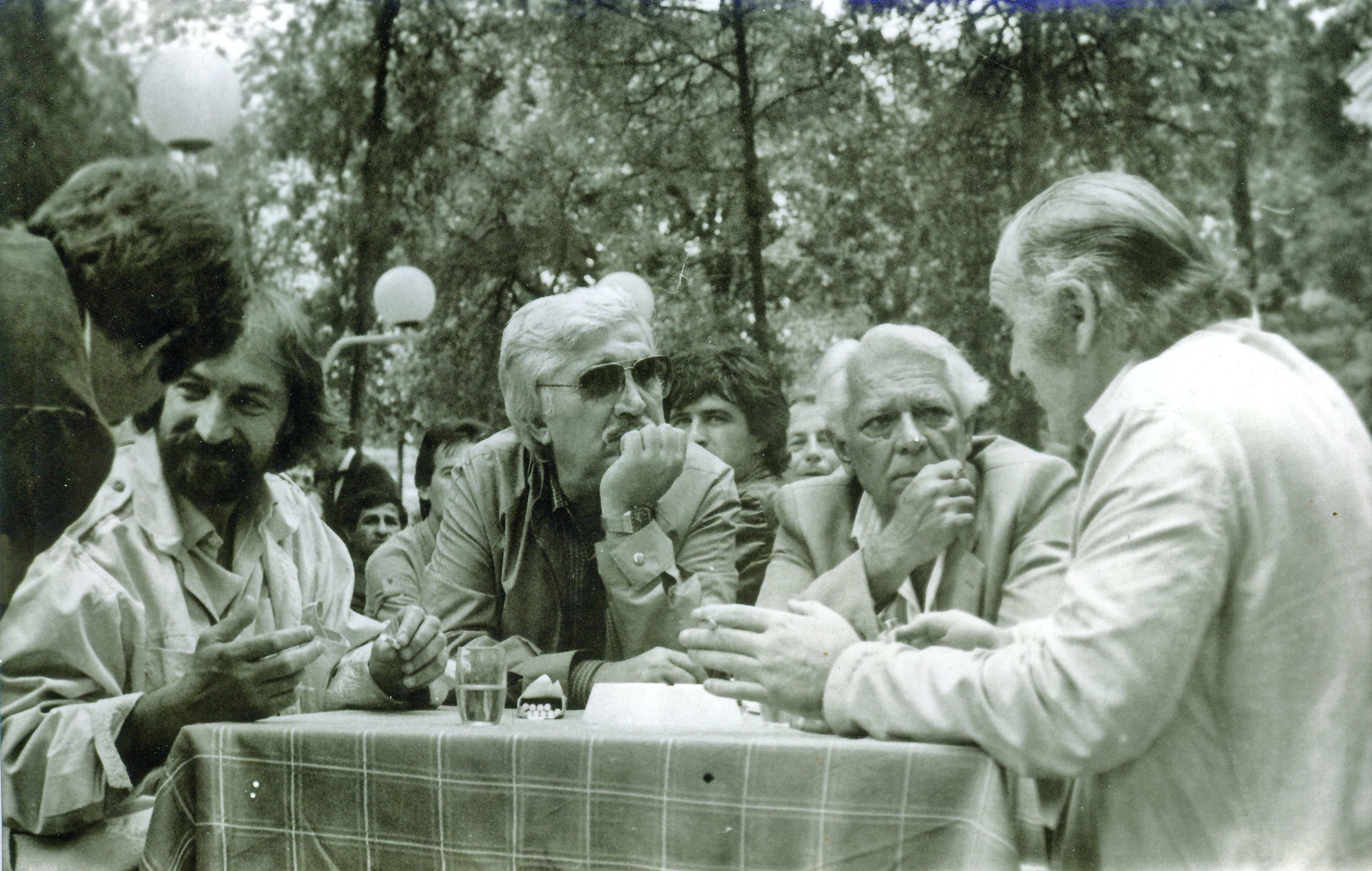 Čuvena jugoslovenska filmska i TV lica na Filmskim susretima u Nišu 1984. godine )sasvim levo makedonski glumac Meto Jovanovski sasvim desno Stole Aranđelović...